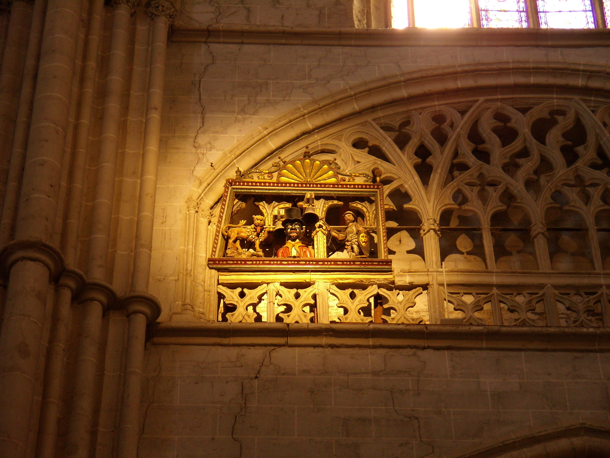 Detalle del triforio de la Catedral de Palencia.